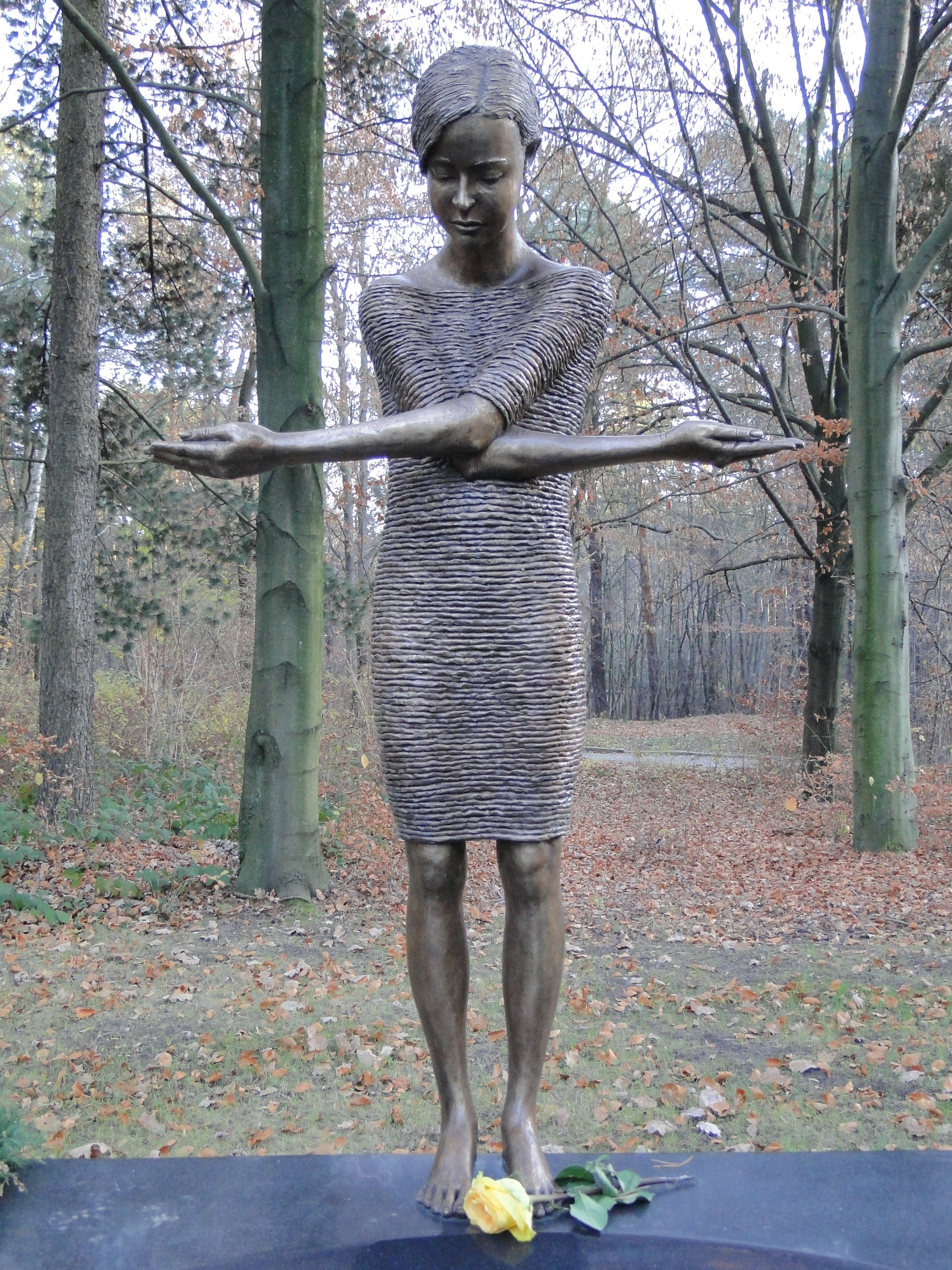 Skulptur Trauerndes Mädchen am Tränenmeer von Malgorzata Chodakowska, Detail